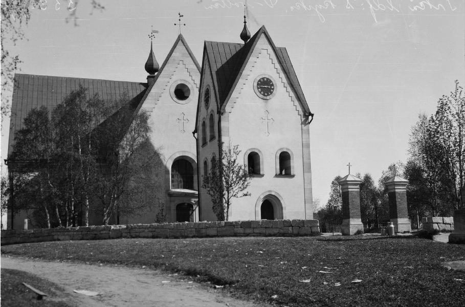 Kyrkan och klockstapeln/klocktornet från söder.